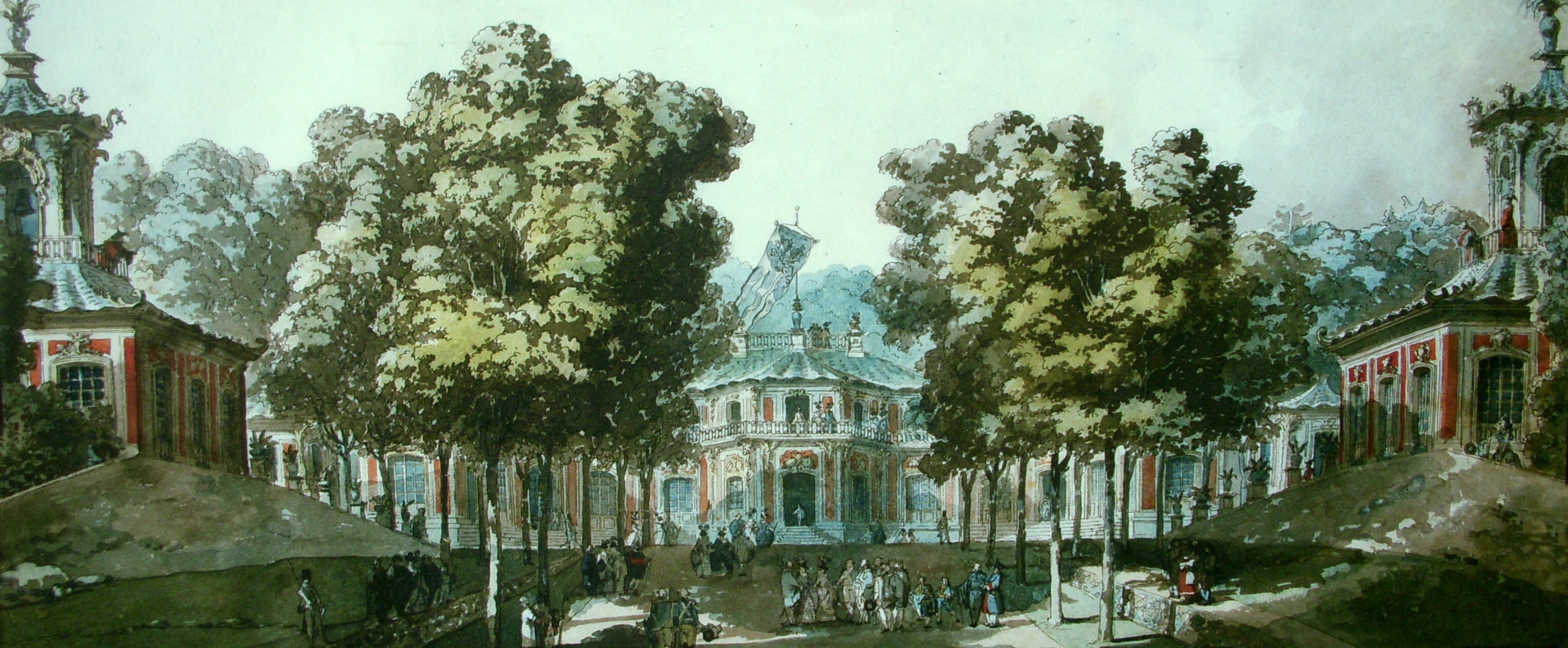 illustration